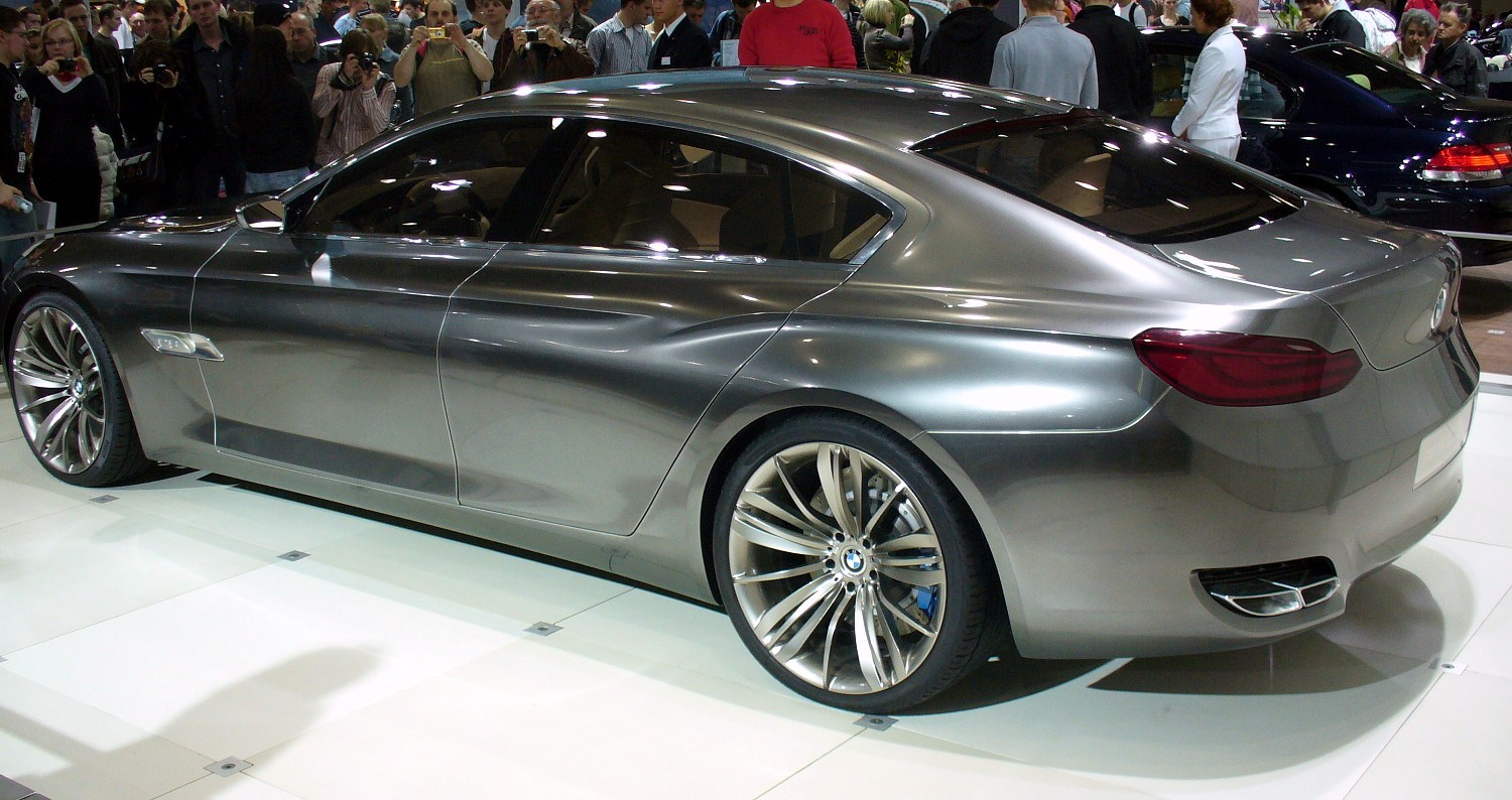 BMW Concept CS